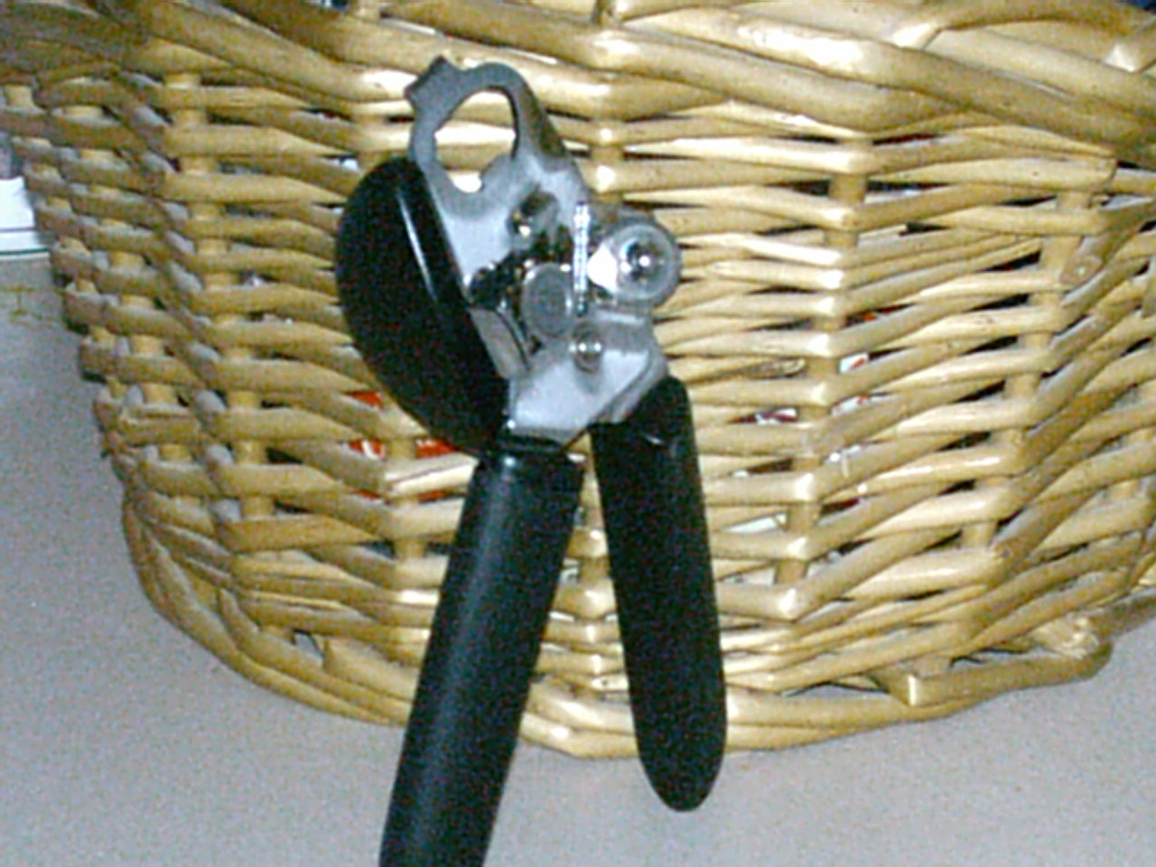 Un abrelatas moderno